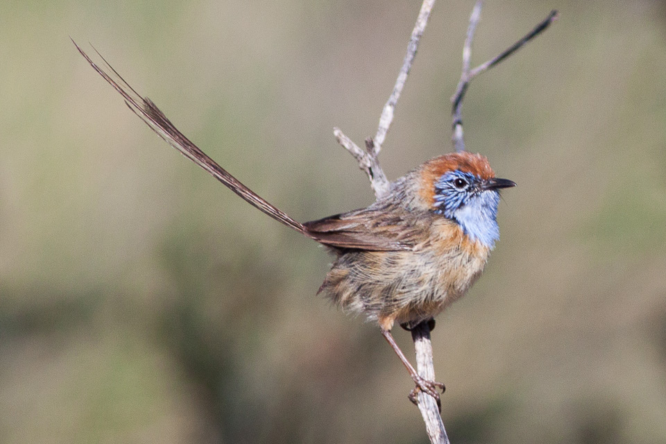 Mallee Emuwren (Stipiturus mallee)